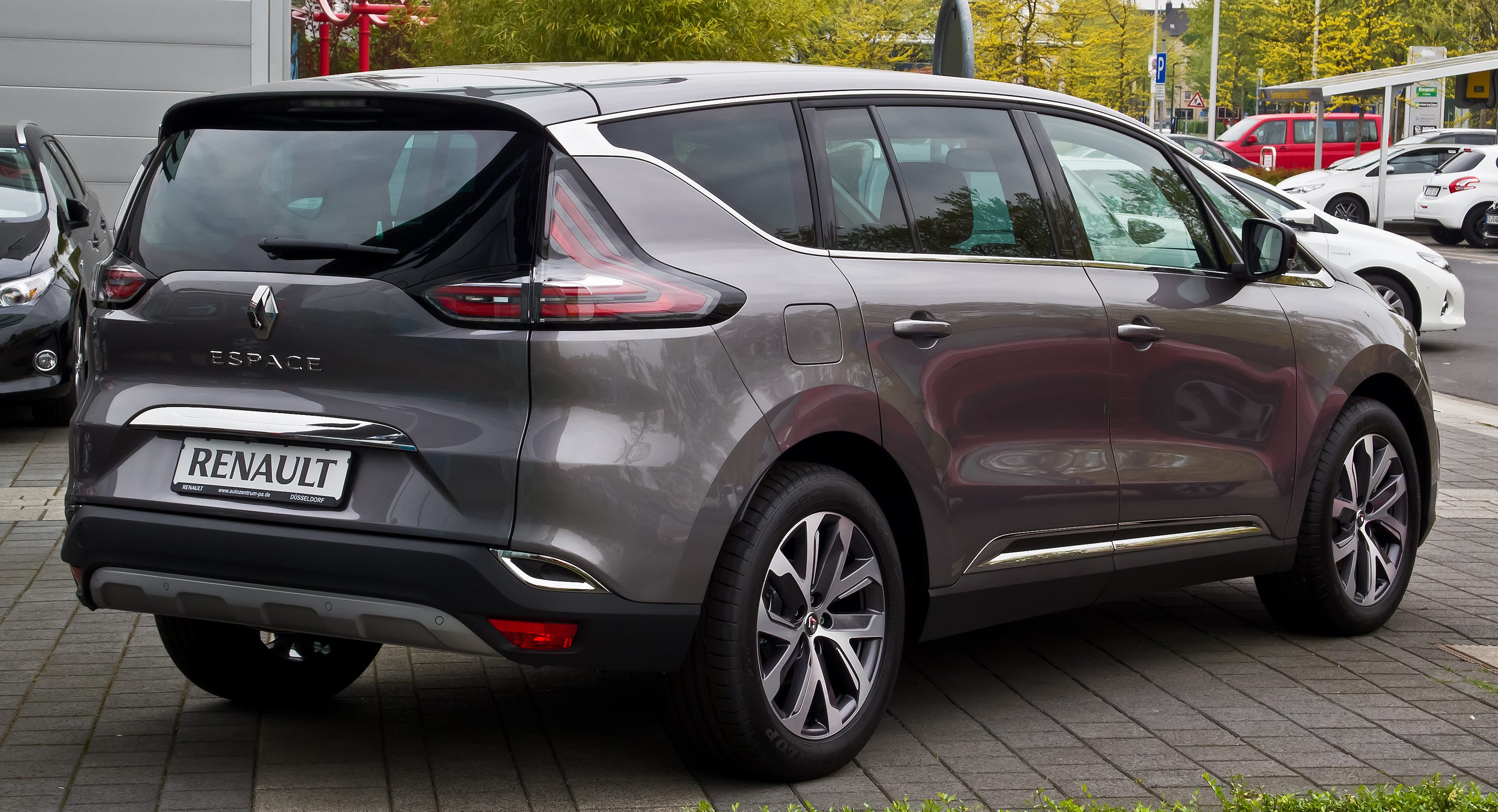 Renault Espace Intens ENERGY dCi 160 EDC (V)